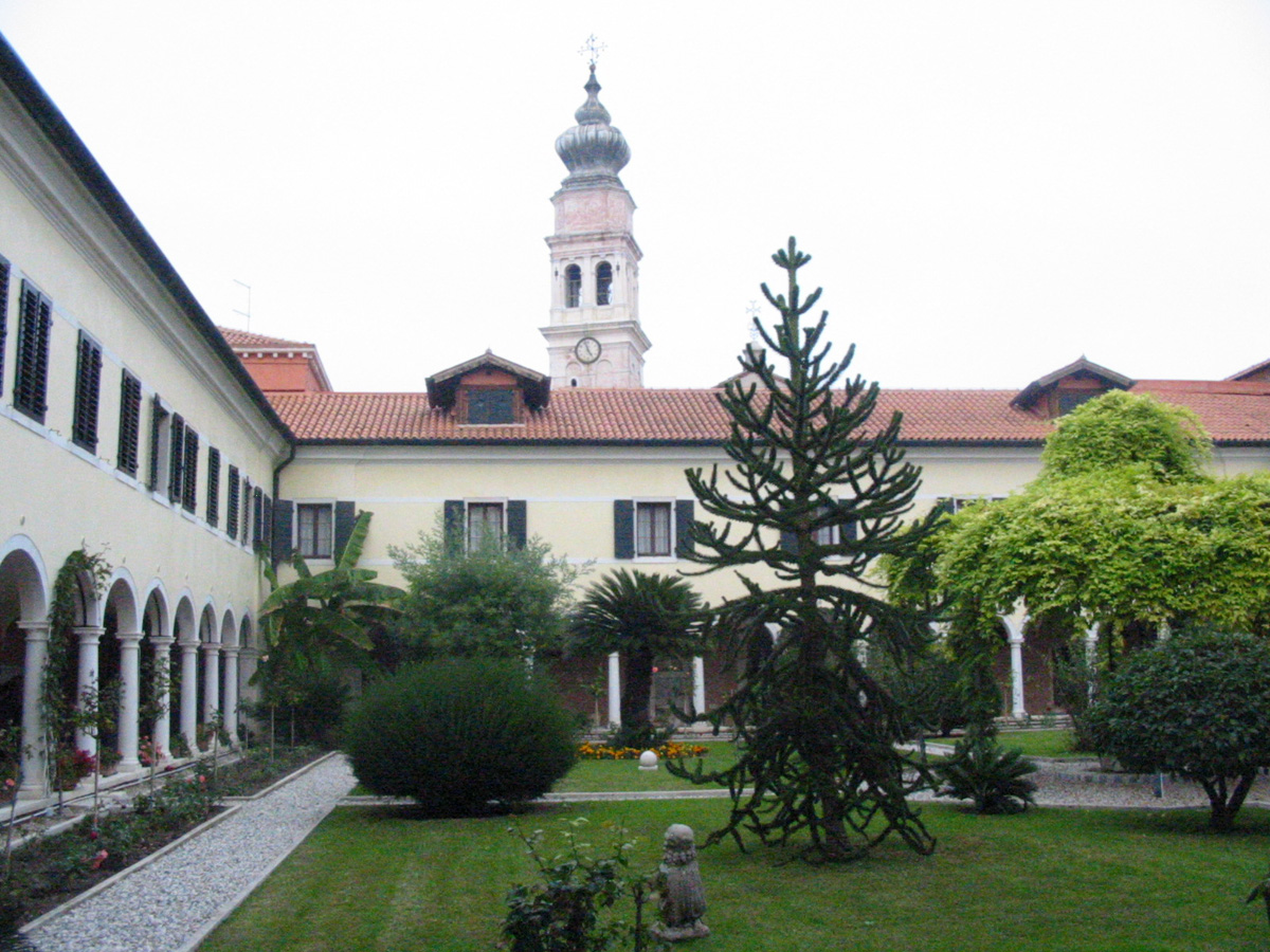 Monastère Santo Lazzari degli Armeni à Venise